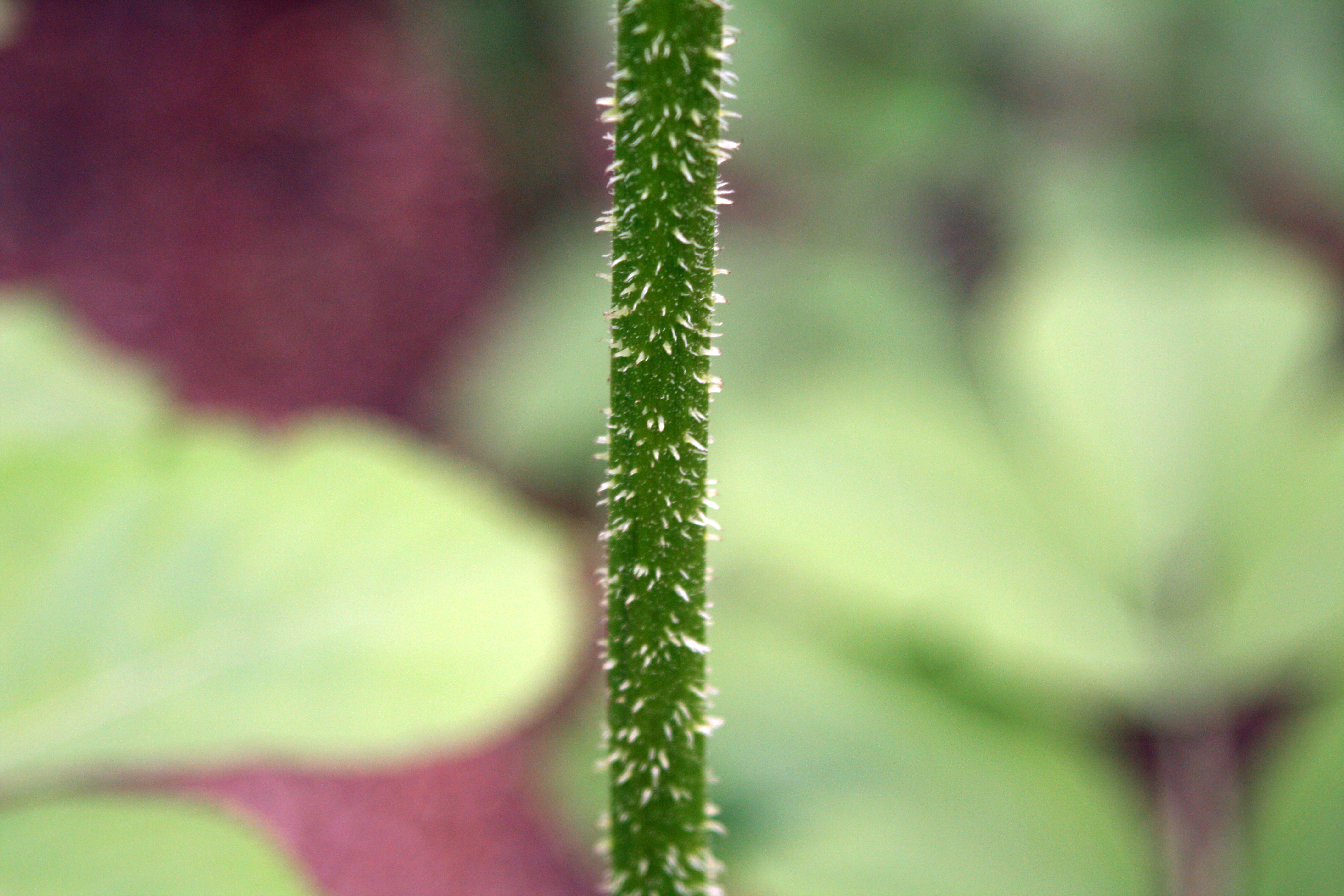 독활, 홍릉수목원